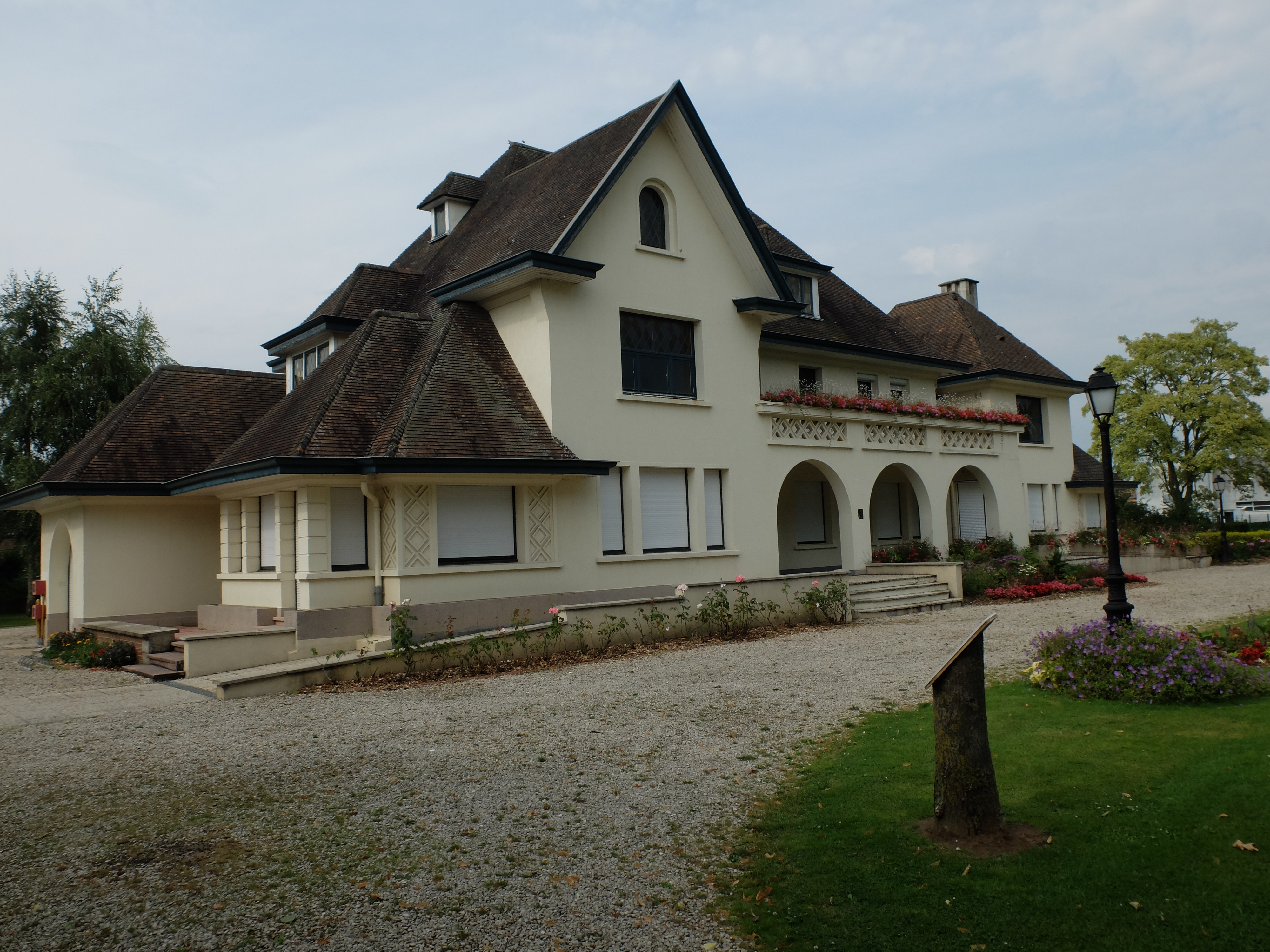 Vue de l'hôtel de ville de Baisieux (Nord).